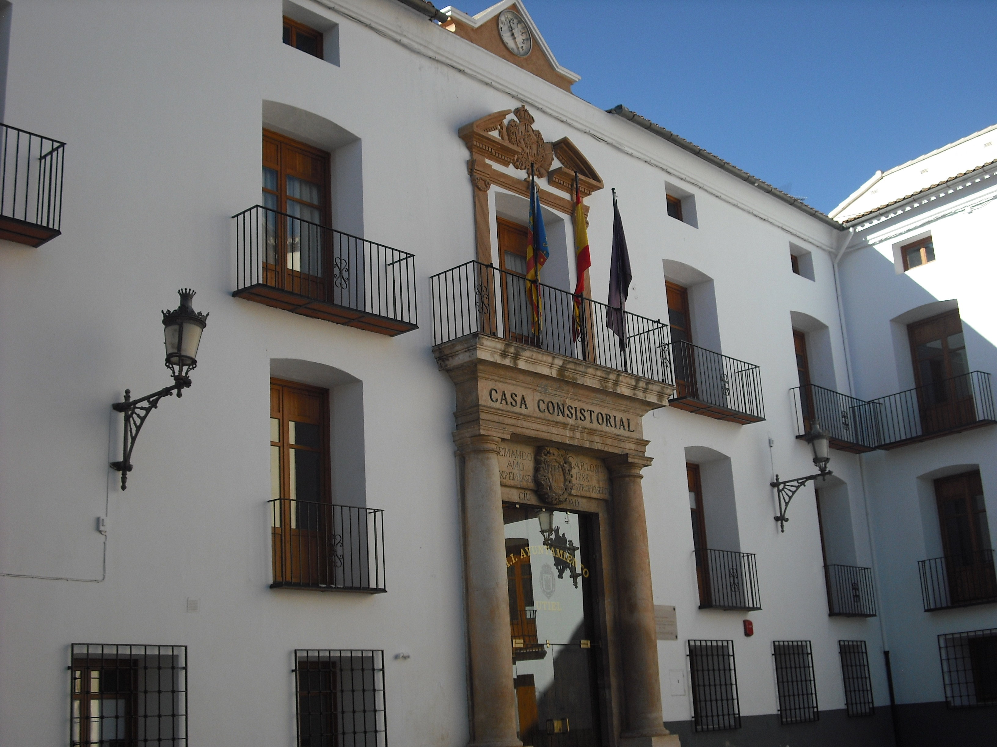 Casa Consistorial (S. XVIII)